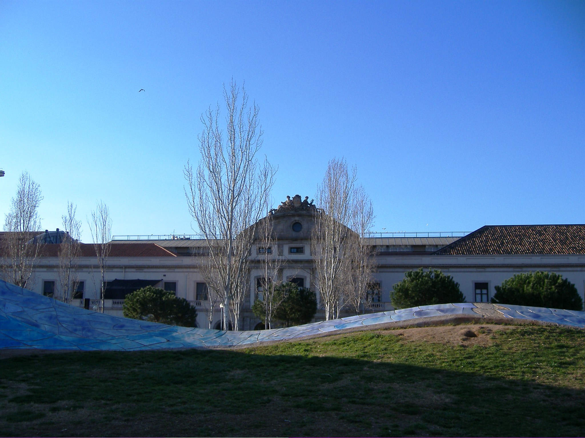 Vista de la façana antiga estació del Nord de Barcelona, orientació mar.